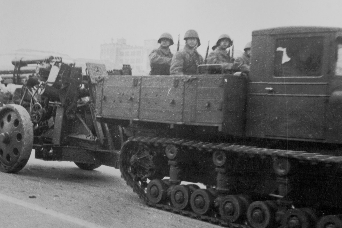 Артиллерия. Военный парад в Куйбышеве 7 ноября 1941 г.